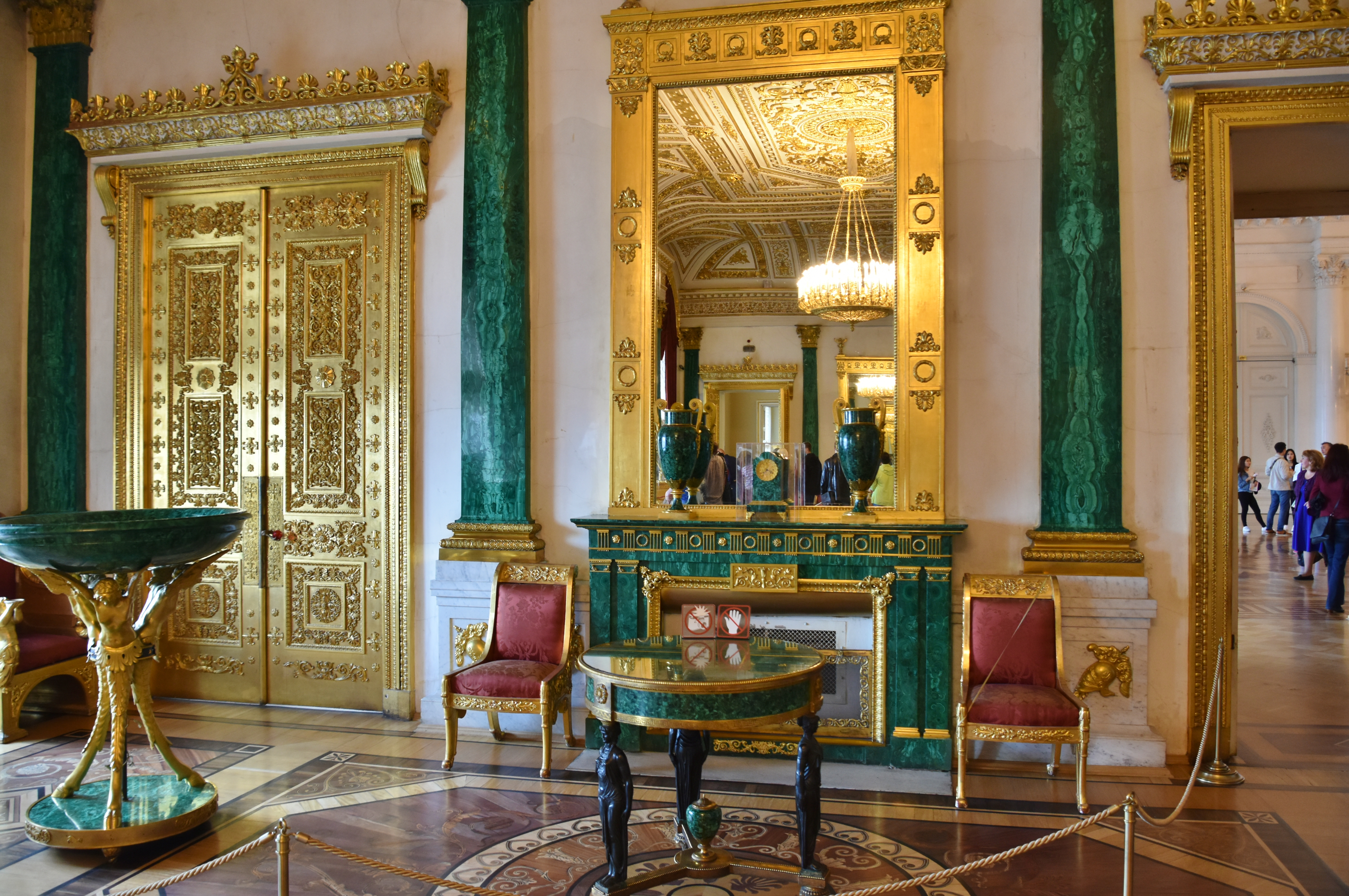 Hermitage Museum, St. Petersburg (12)